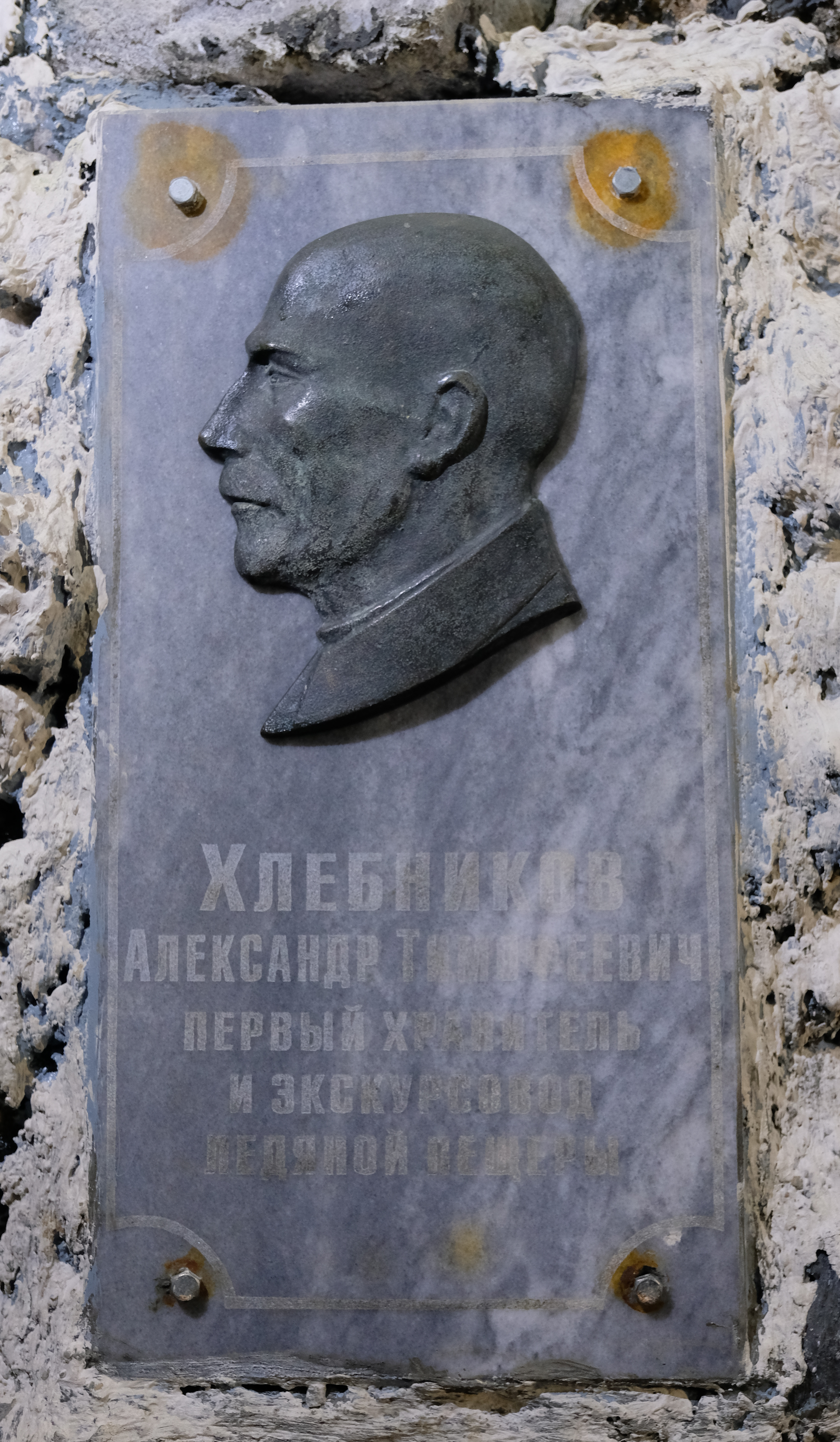 Кунгурская пещера. Грот Хлебниковых. Памятная табличка Хлебникову А. Т.